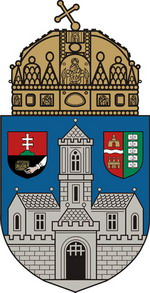 Az Óbudai Egyetem cimere.